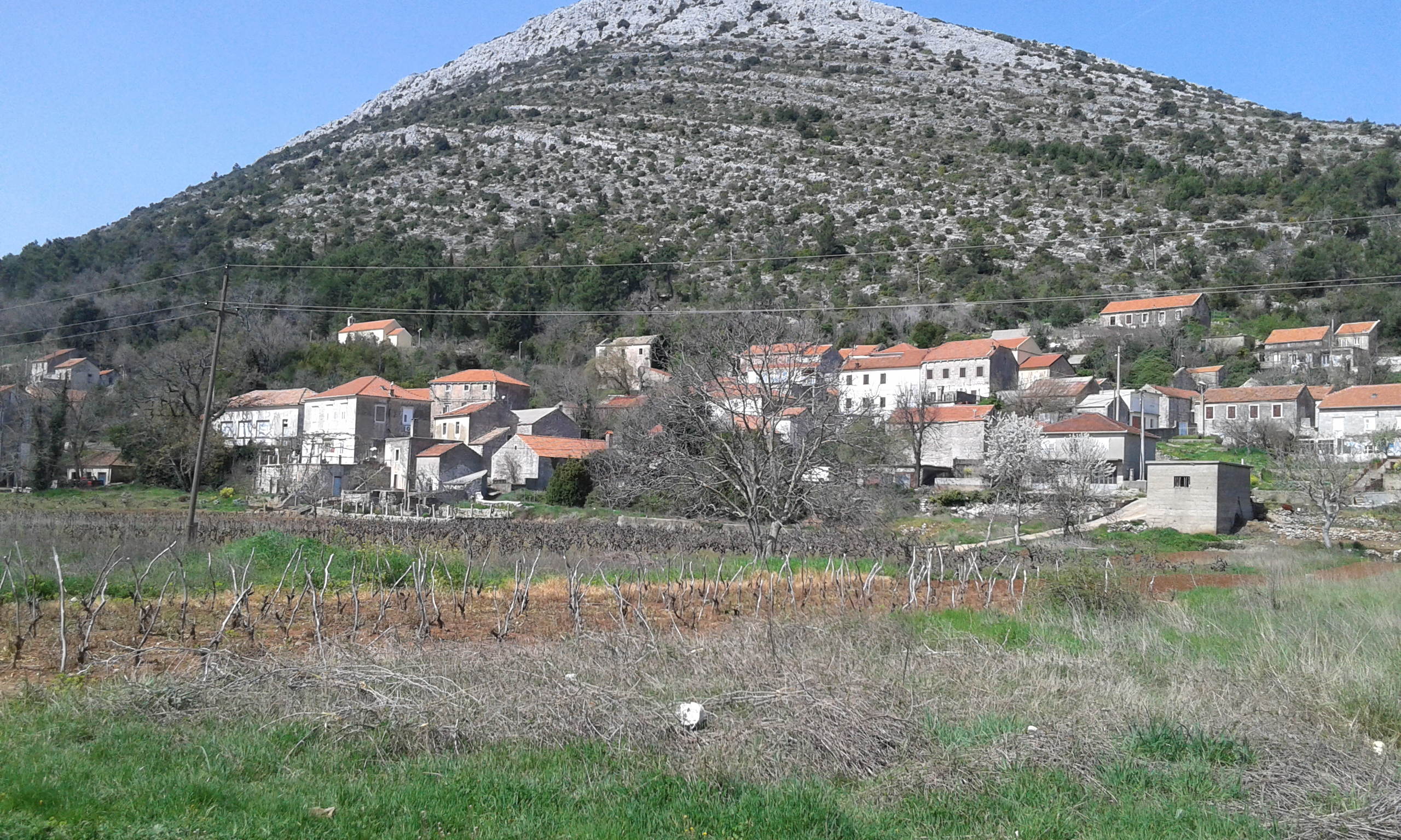 Oskorušno